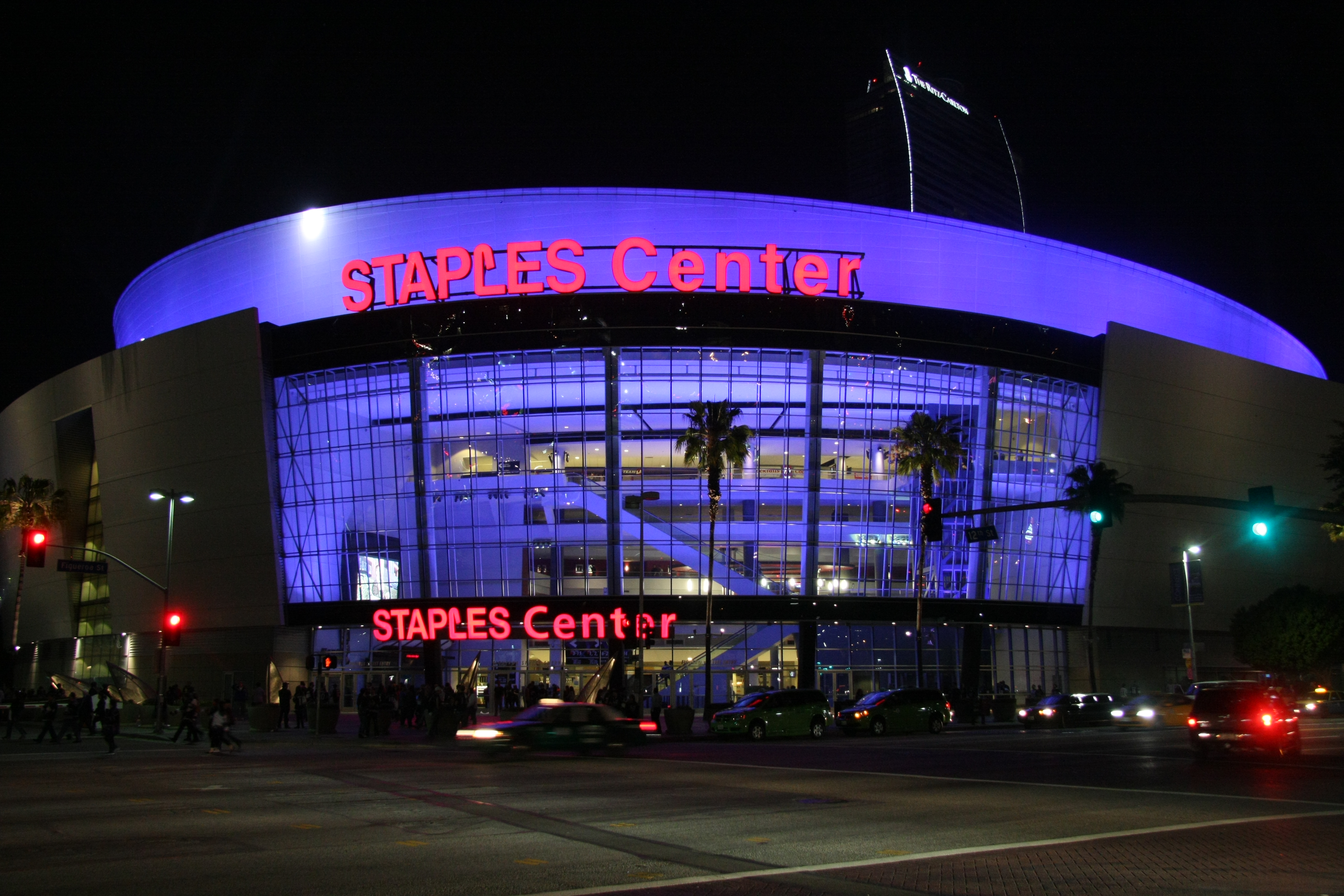 Staples Center bei Nacht